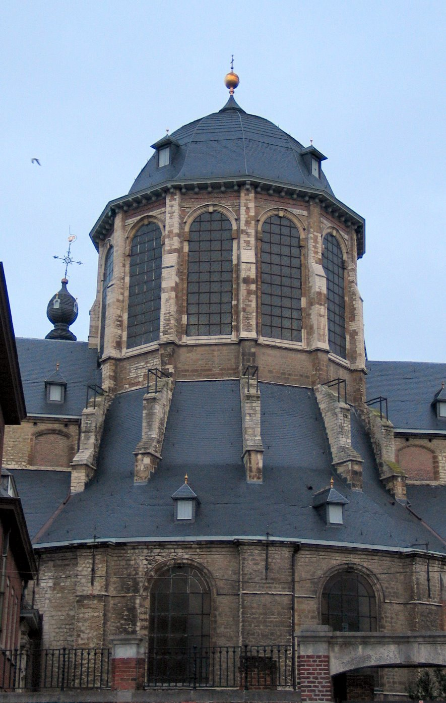 koepel van de Hanswijkbasiliek - eigen foto